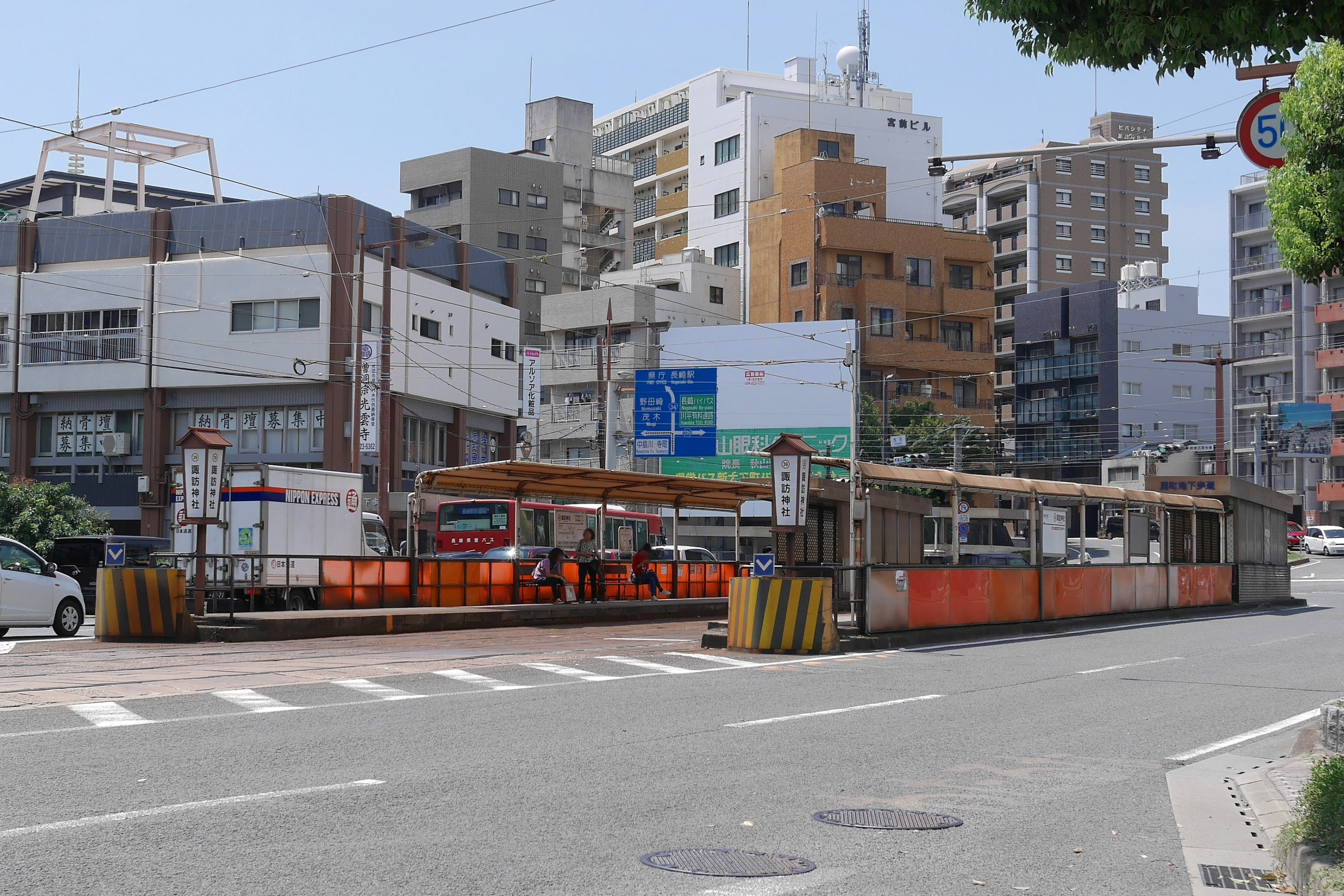 長崎電気軌道の諏訪神社停留場（長崎県長崎市）。2018年8月に諏訪神社前から改称された。